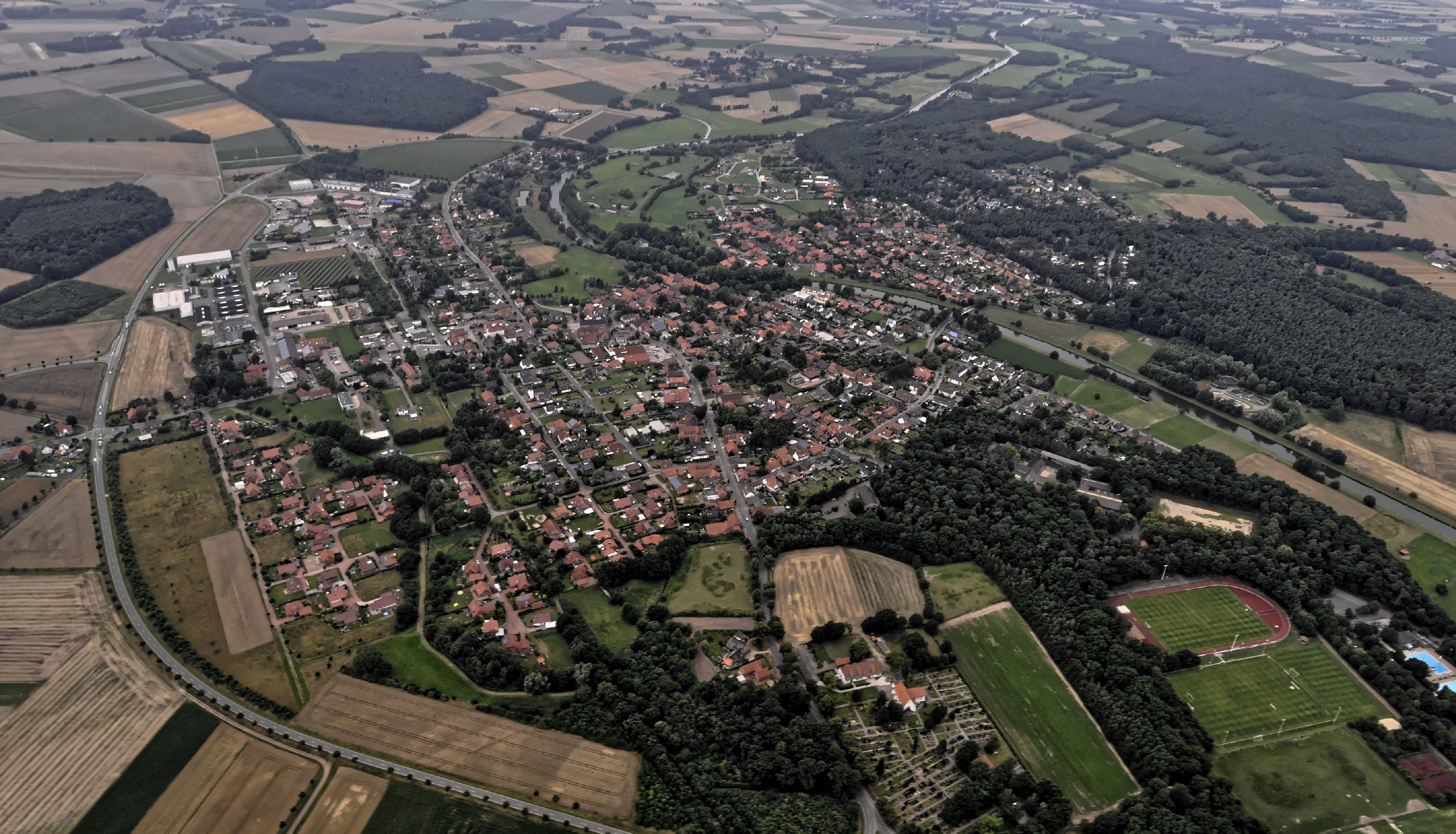 Bilder vom Flug Nordholz-Hammelburg 2015: Steyerberg